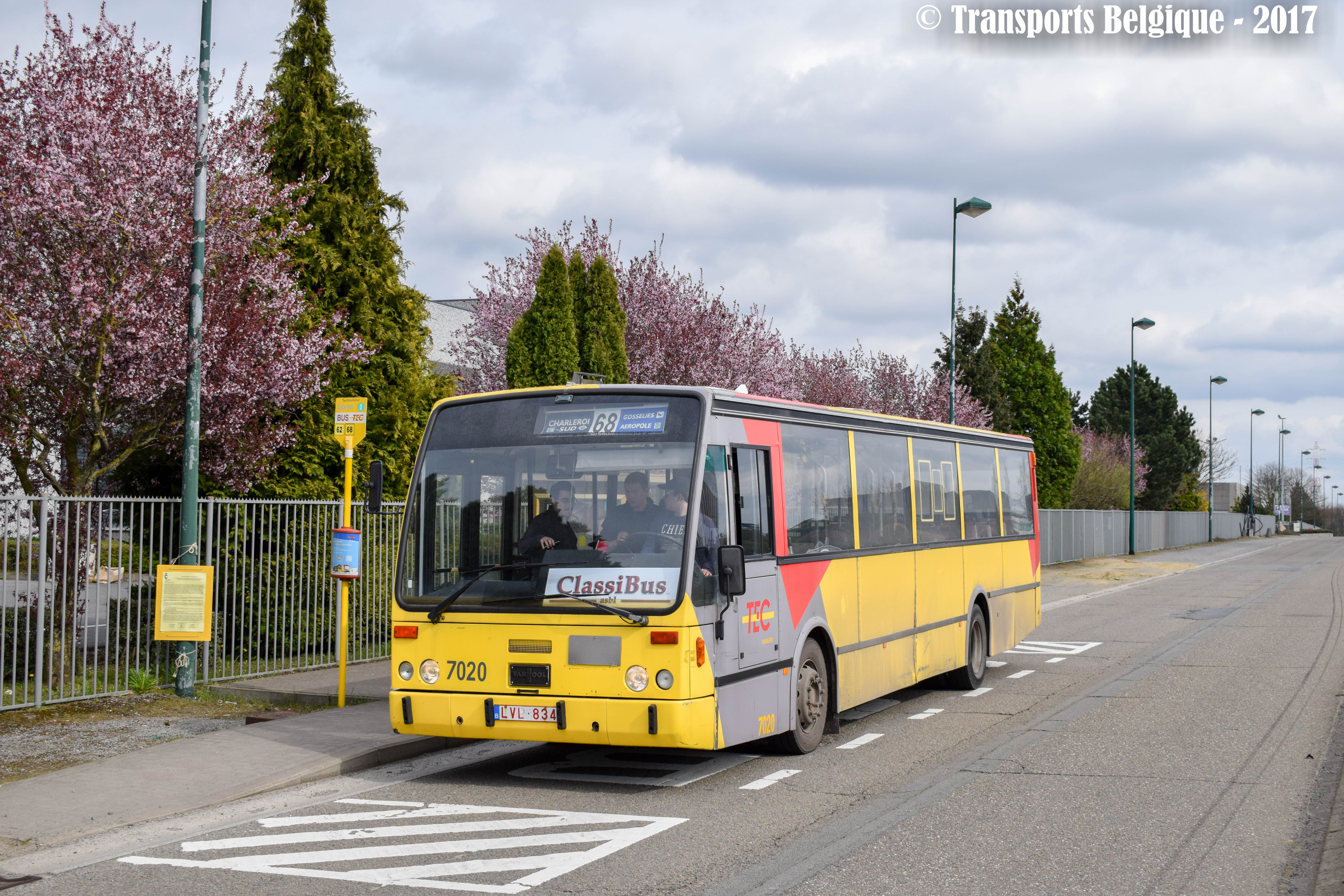 Balade lors de l'acquisition du véhicule le 29.03.17 par Classibus. Ce véhicule sauvegardé sera incendié 2 semaines plus tard, début avril 2017 par des vandales et donc totalement irrécupérable.